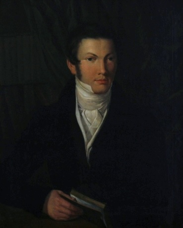 Portret Edwarda Rastawieckiego